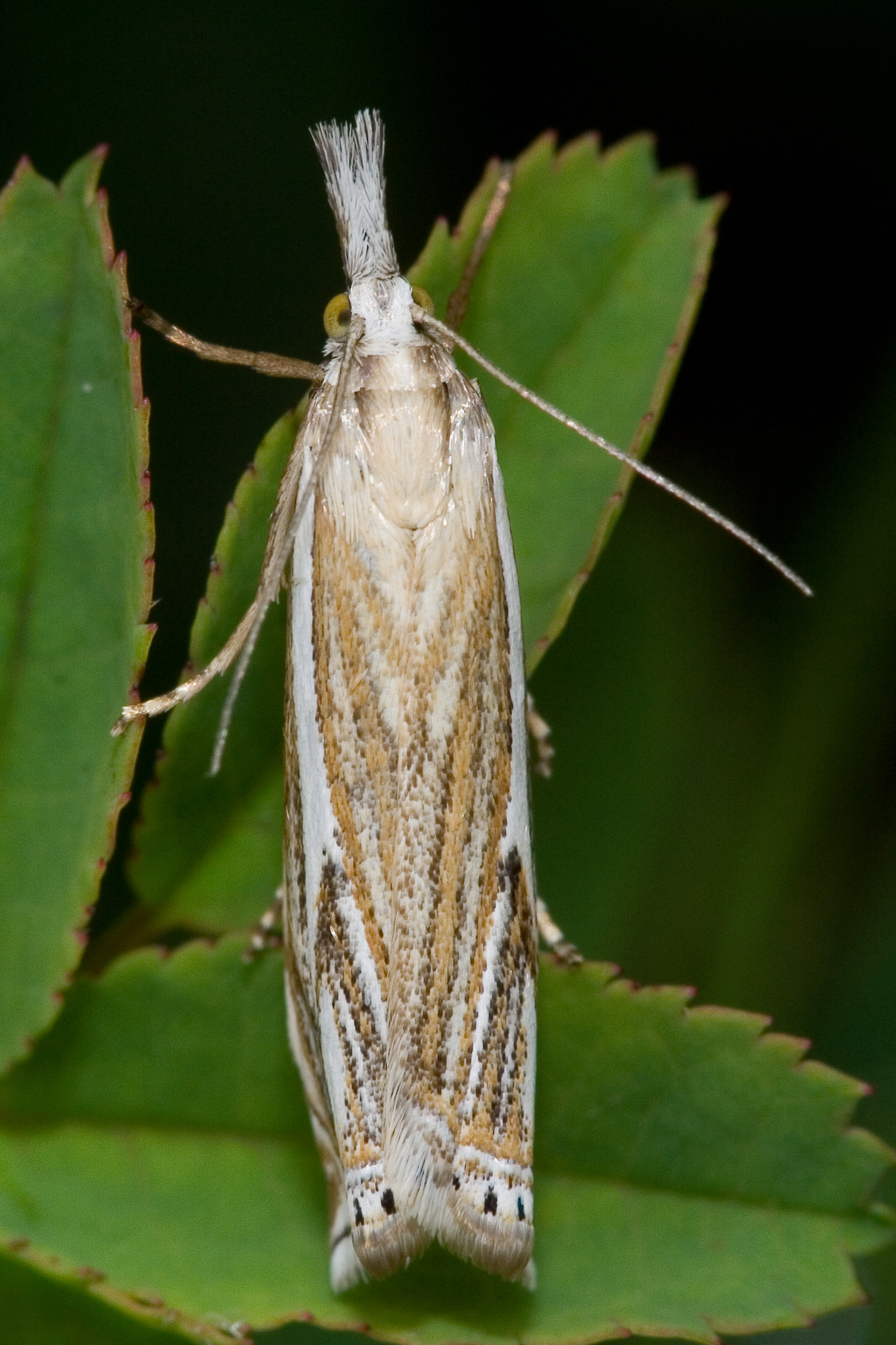 Crambus lathoniellus